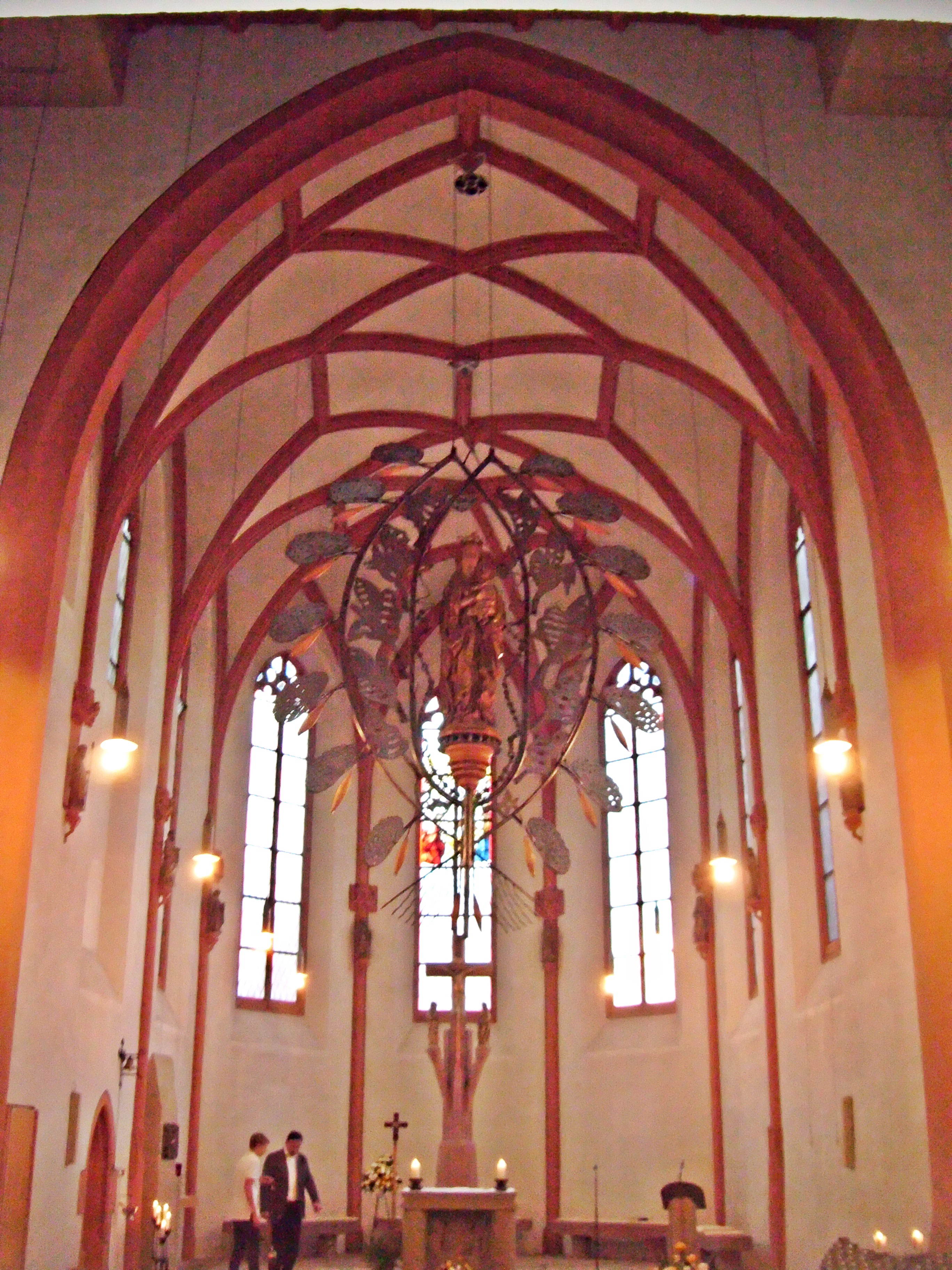 Neuleiningen kath. St. Nikolaus Kirche, Chor, innen